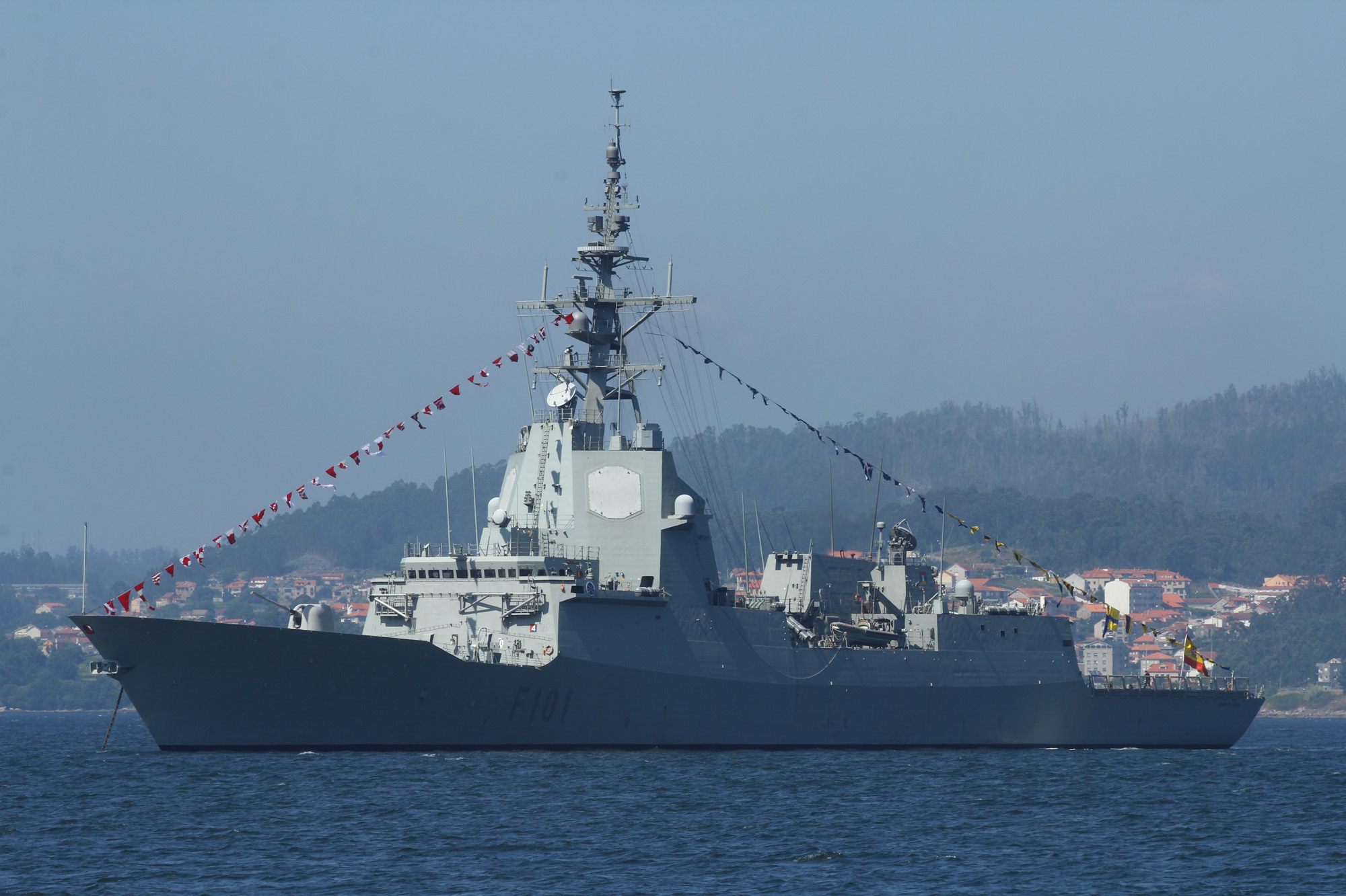 Visita a la Escuela Naval Militar de Marín. Julio de 2014